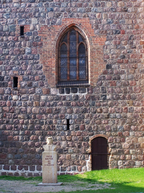 Feldsteinfassade der Kirche in Friedland mit Fritz-Reuter-Denkmal